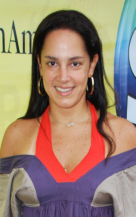 Apresentadora "Sílvia Abravanel".